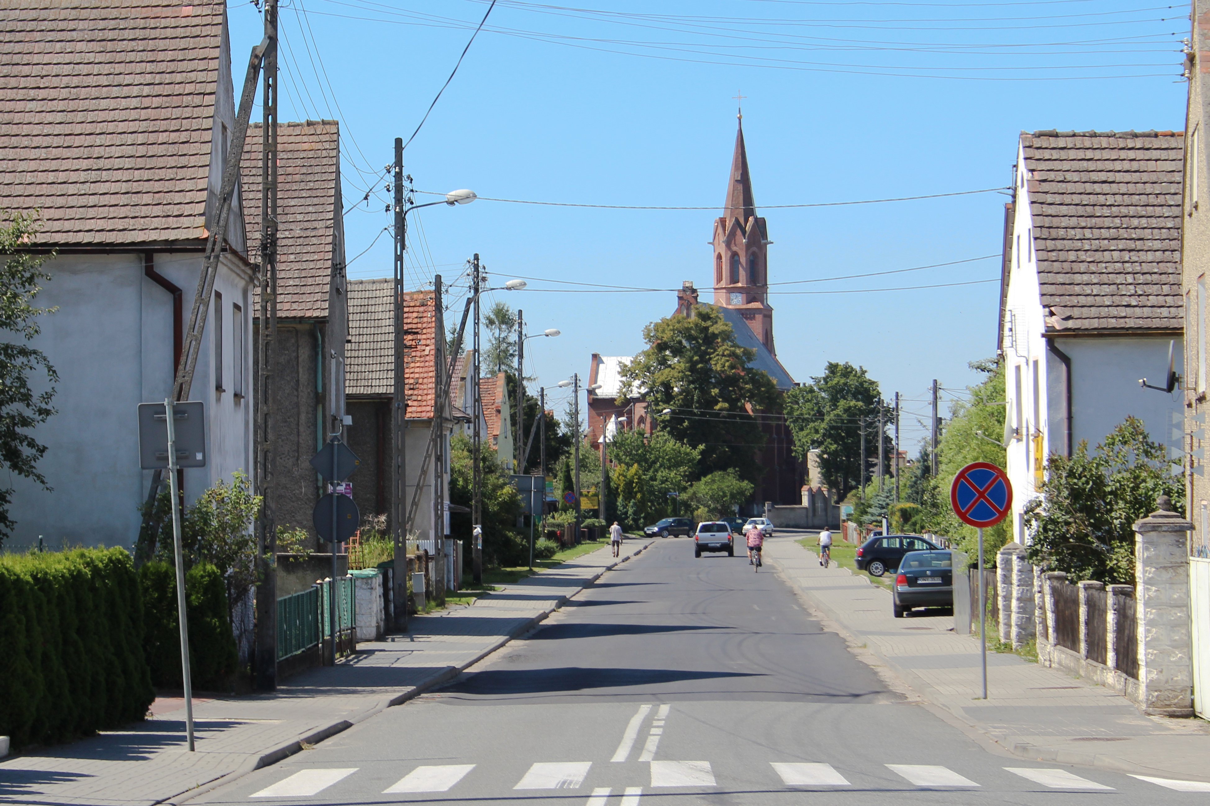 Łambinowice - wieś w Polsce w województwie opolskim, w powiecie nyskim w gminie Łambinowice, której jest siedzibą.